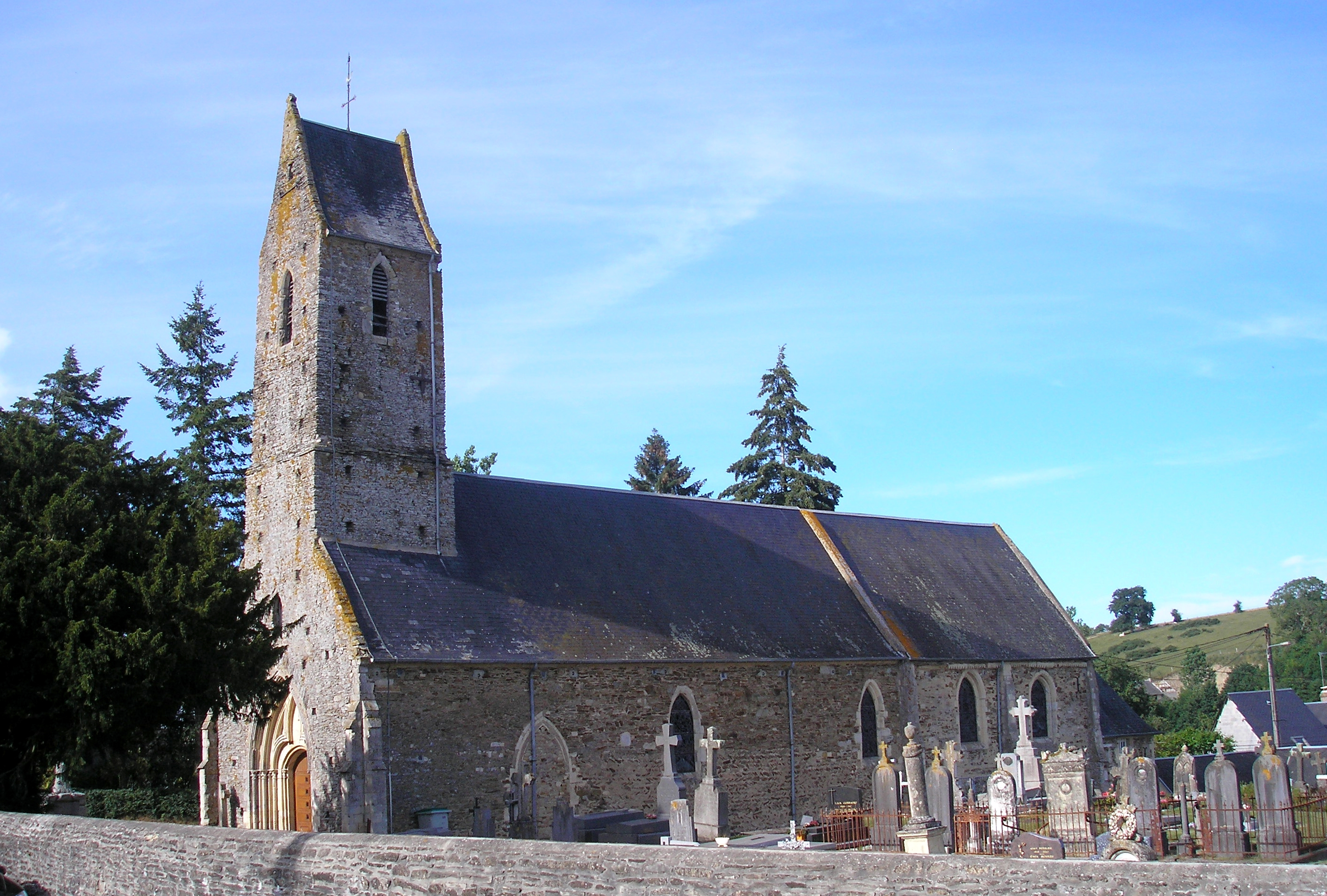 Saint-Louet-sur-Seulles (Normandie, France). L'église Saint-Louet.